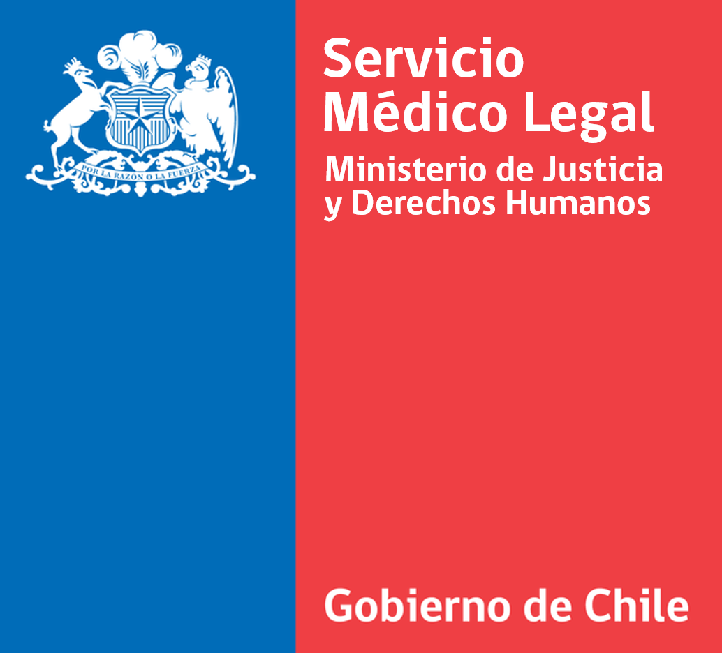 Logo Institucional del Servicio Médico Legal.